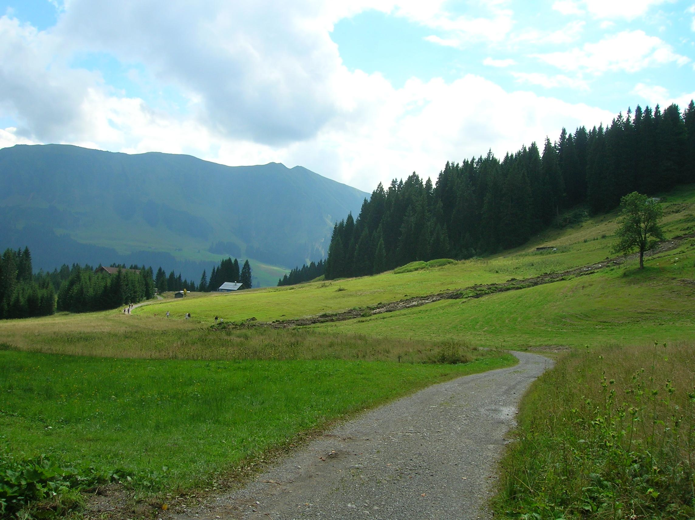 Eine Plaike, selbst fotografiert